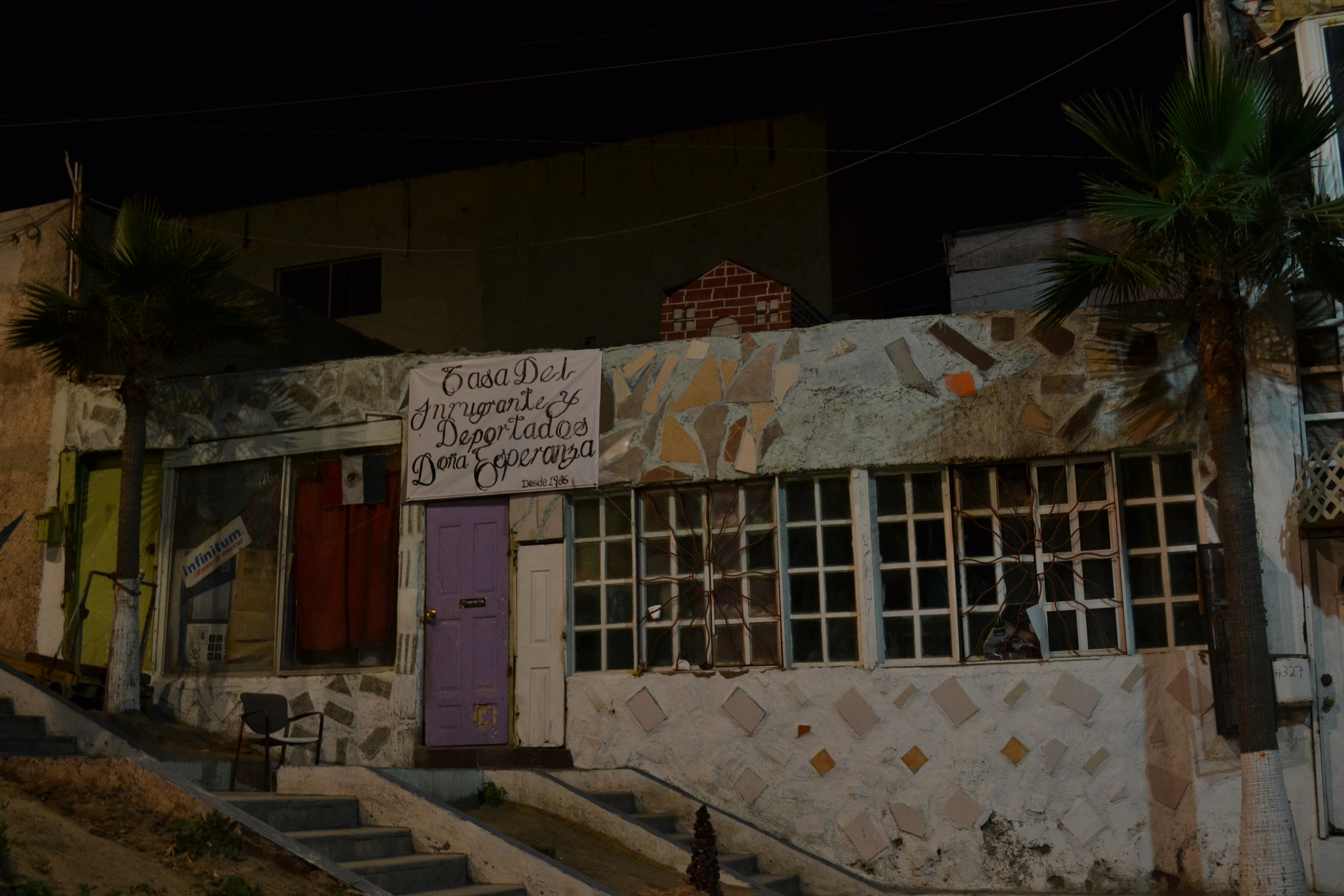 La imagen presenta un inmueble adaptado para la recepción de personas migrantes quienes buscan ayuda en su estancia temporal en la ciudad